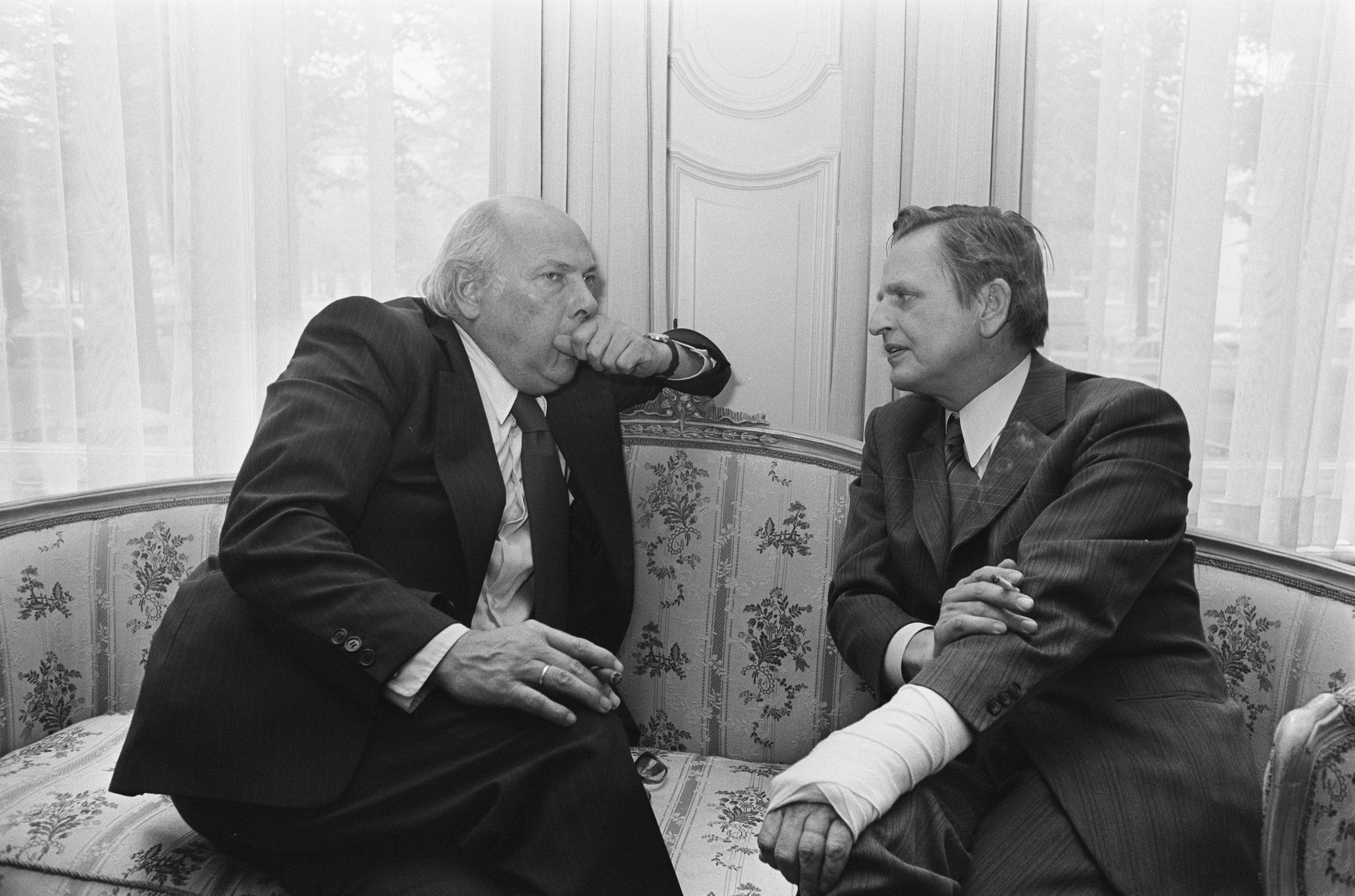 Collectie / Archief : Fotocollectie Anefo Reportage / Serie : [ onbekend ] Beschrijving : Premier Den Uyl (links) spreekt met premier Palme van Zweden op ambassade in Den Haag Datum : 12 september 1974 Locatie : Den Haag, Zuid-Holland Trefwoorden : ambassades Persoonsnaam : Uyl, Joop den Fotograaf : Verhoeff, Bert / Anefo Auteursrechthebbende : Nationaal Archief Materiaalsoort : Negatief (zwart/wit) Nummer archiefinventaris : bekijk toegang 2.24.01.05 Bestanddeelnummer : 927-4474